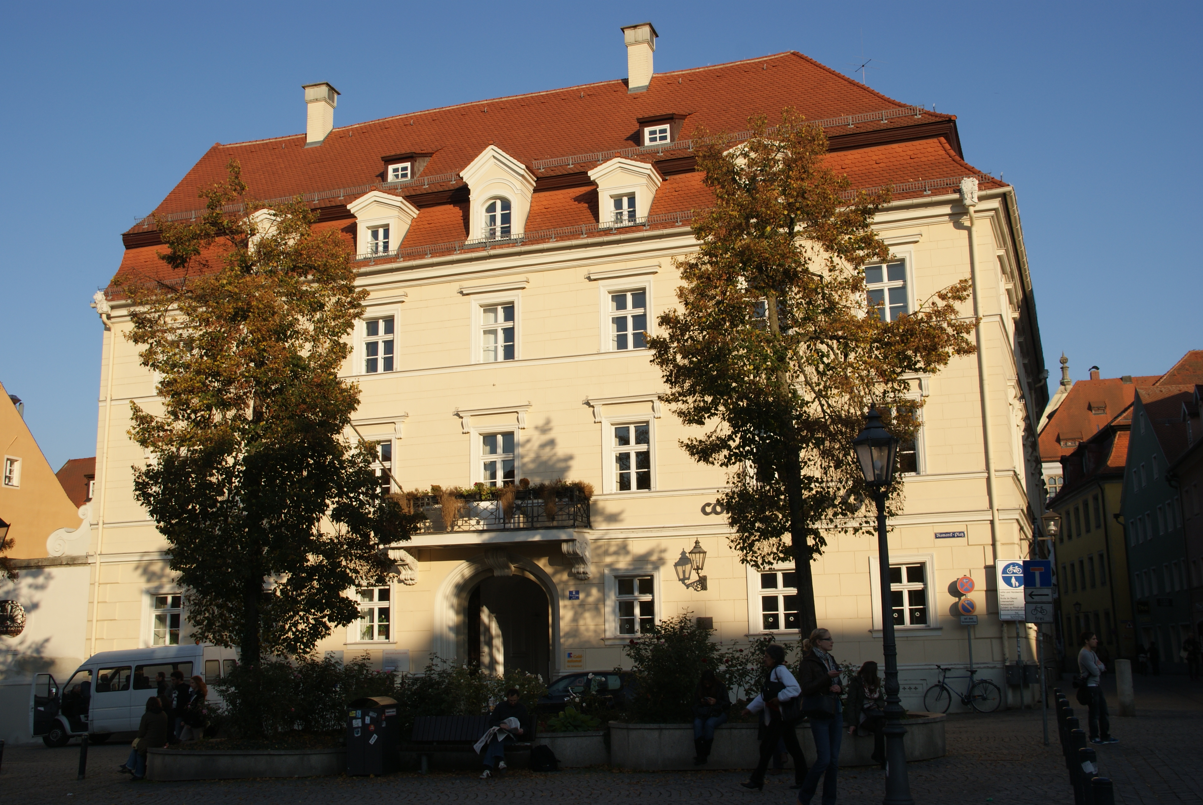 Prüfeninger Hof. 1701 erbautes Stadtpalais des Klosters Prüfening am Bismarckplatz in Regensburg, später Erbprinzenpalais der Fürsten von Thurn und Taxis, im 19. Jahrhundert klassizistisch umgebaut.